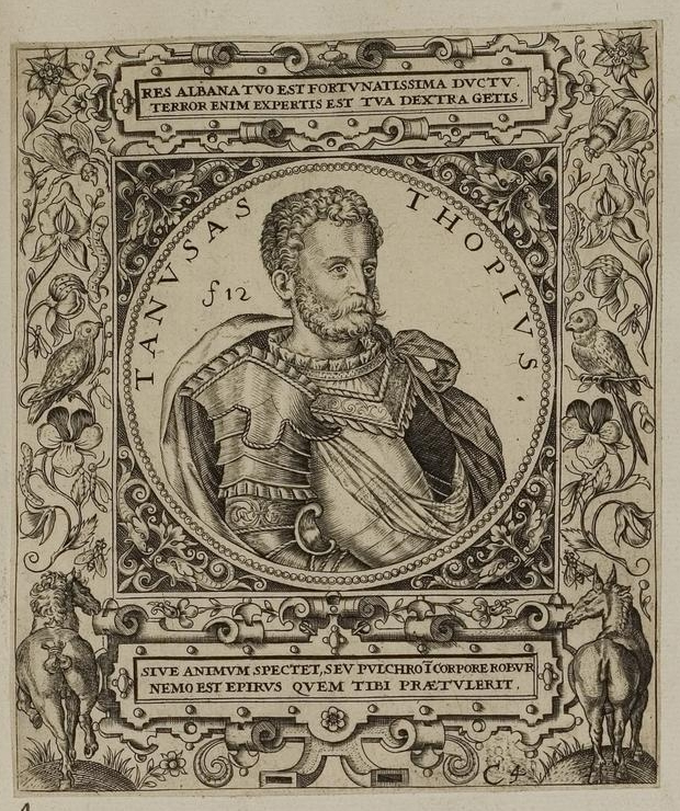 Grafik aus dem Klebeband Nr. 1 der Fürstlich Waldeckschen Hofbibliothek Arolsen Illustration aus: Georg Greblinger: Wahre Abbildungen der Türckischen Kayser vnd Persischen Fürsten / so wol auch anderer Helden und Heldinnen von dem Osman / biß auf den andern Mahomet. Johann Ammon, Frankfurt 1648 Motiv: "Tanusas Thopius" (Tanush Thopia)